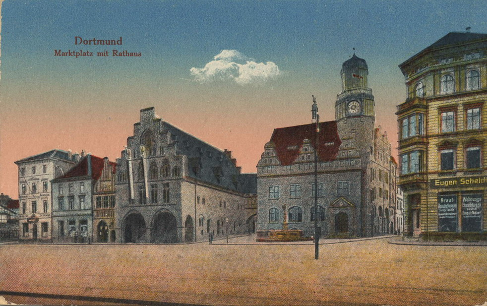 Historische Postkarte: Marktplatz Dortmund